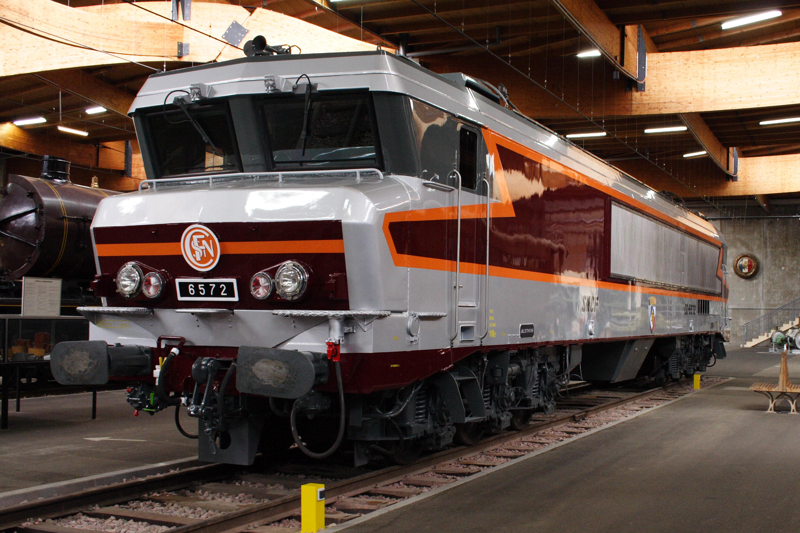 an electric locomotive CC-6572 at Cité du Train de Mulhouse(Mulhouse, France)